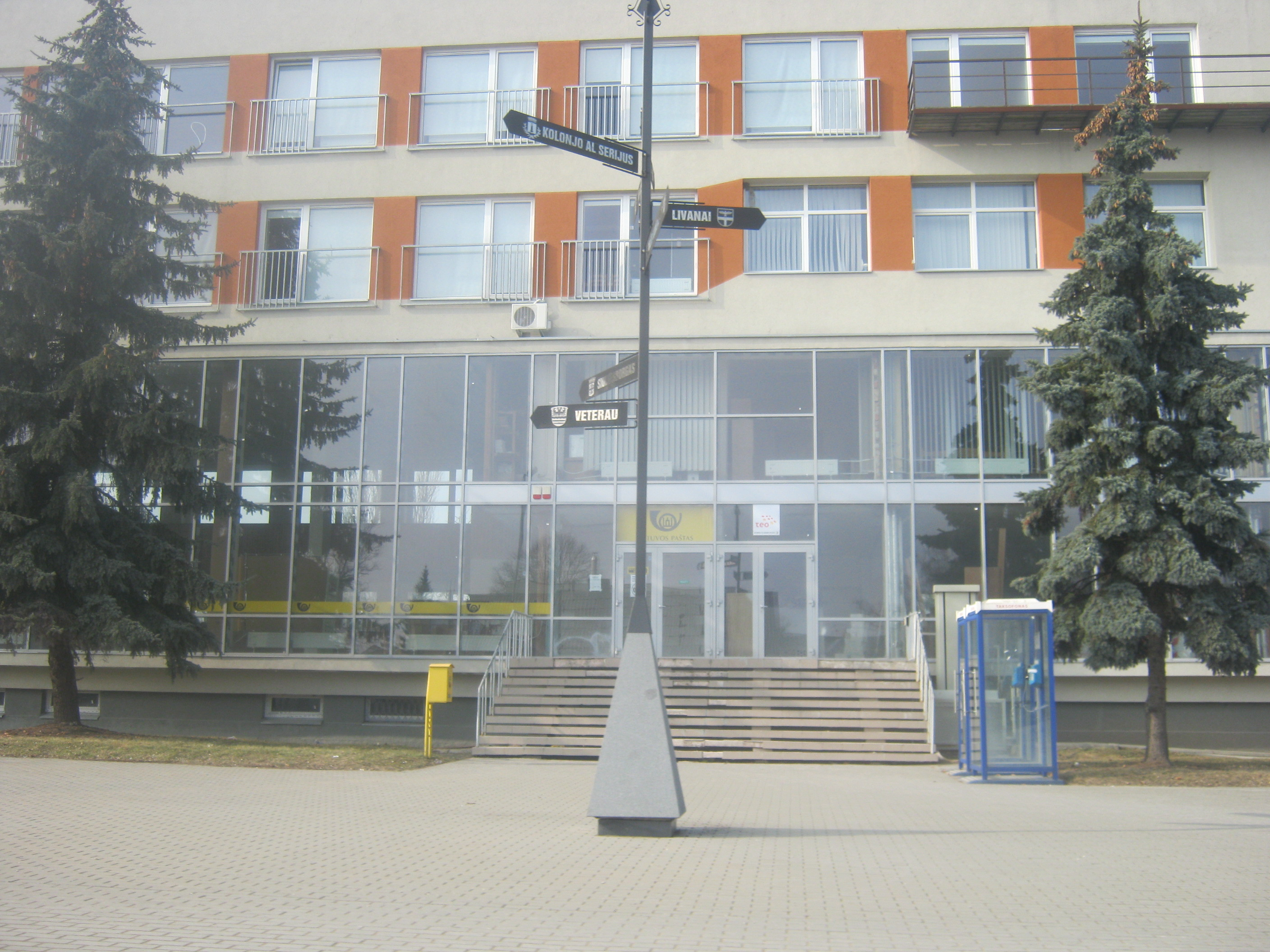 Ukmergė